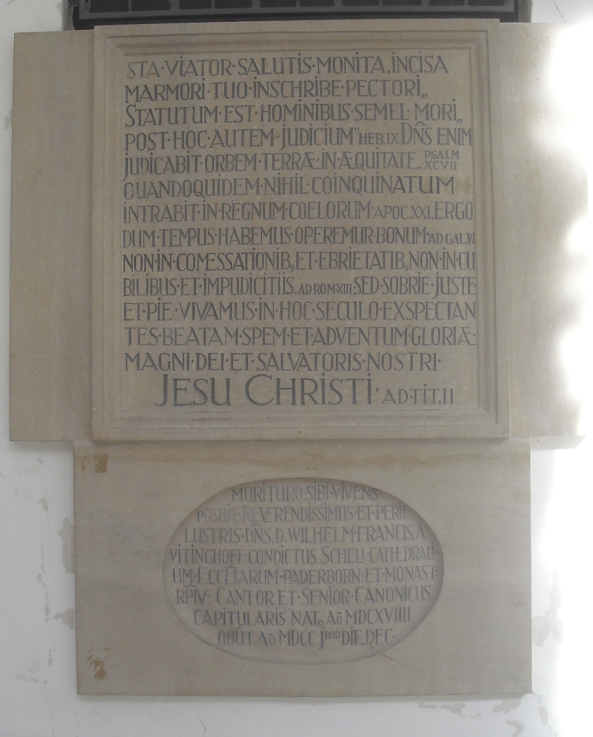 Epitaph Wilhelm Franz von Vittinghoff im Paderborner Dom